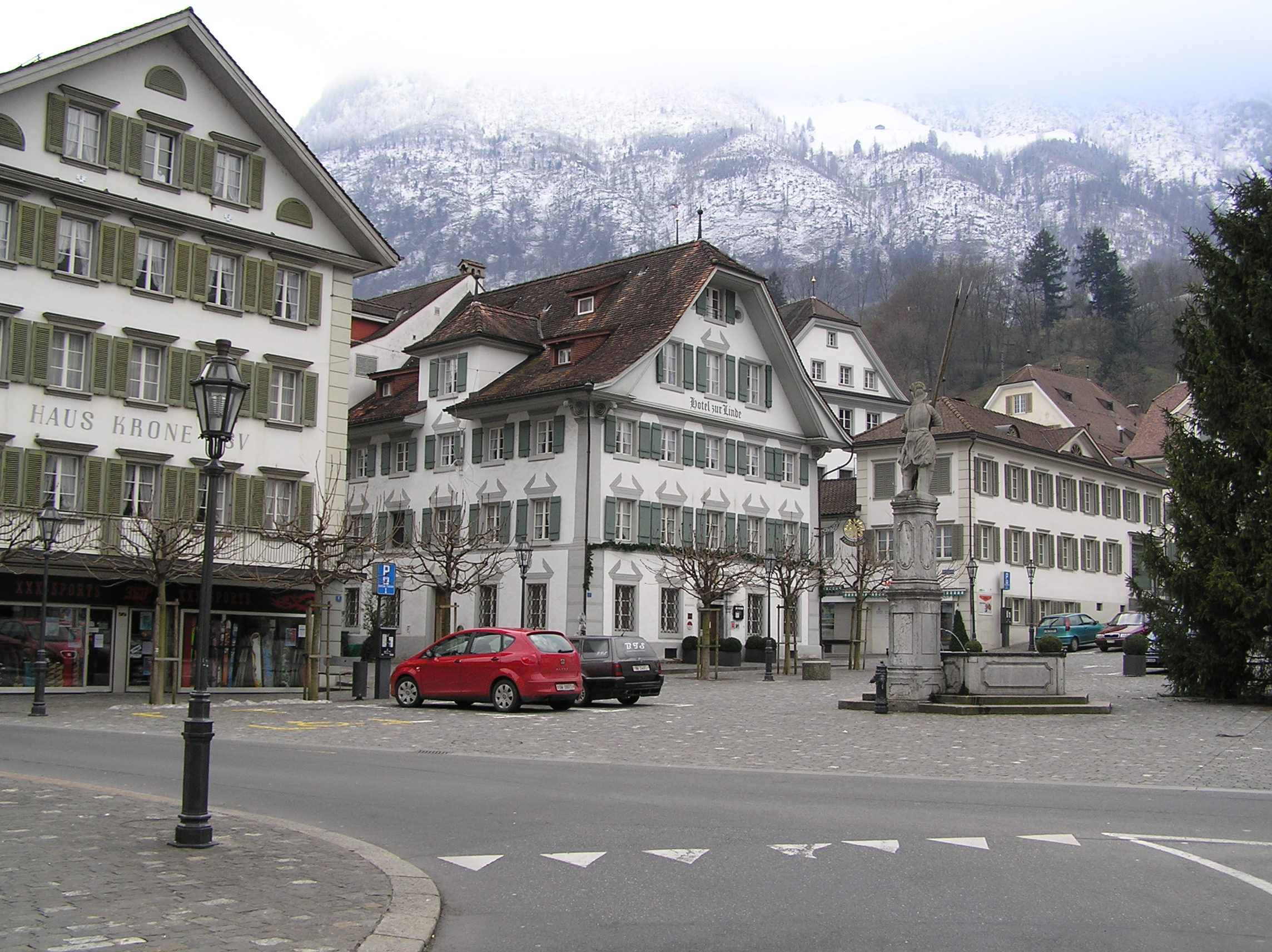 Der Dorfplatz von Stans (Nidwalden)